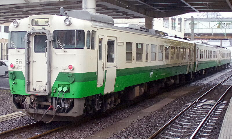 キハ40東北色